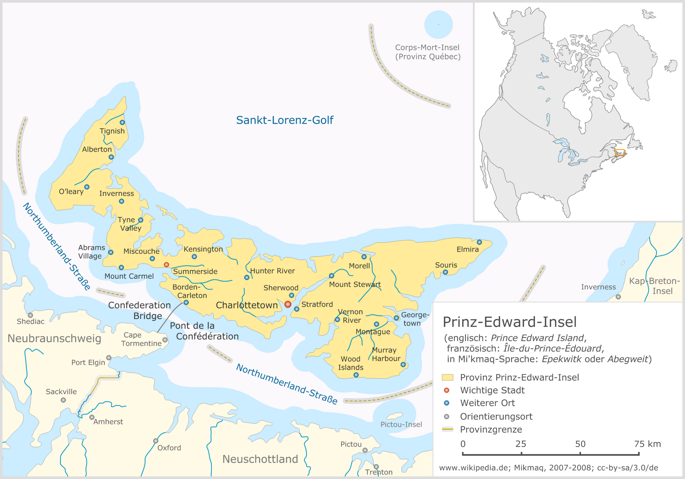 Prinz Edward Insel